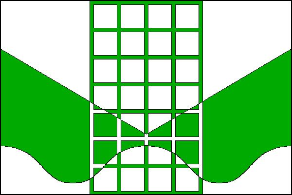 Vlajka obce Rokle v okrese Chomutov